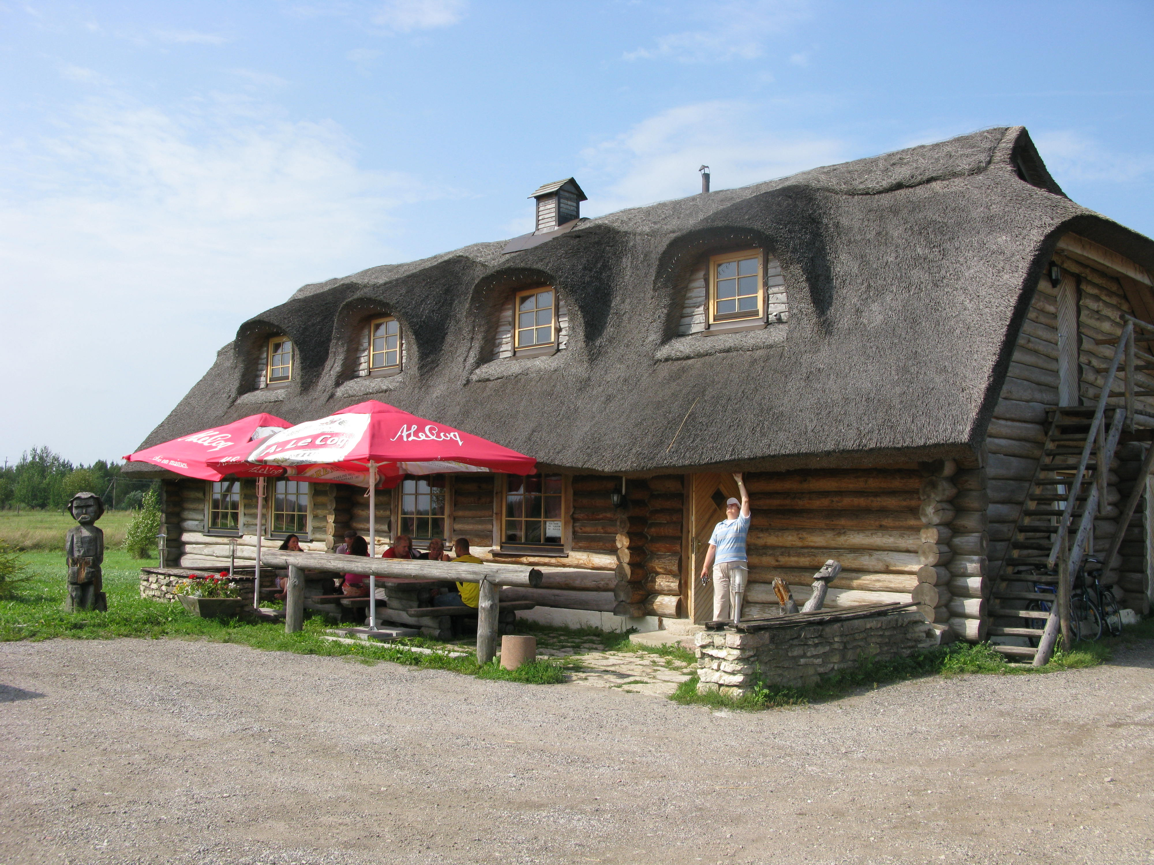 Trahter Birgit, Hälvati, Läänemaa